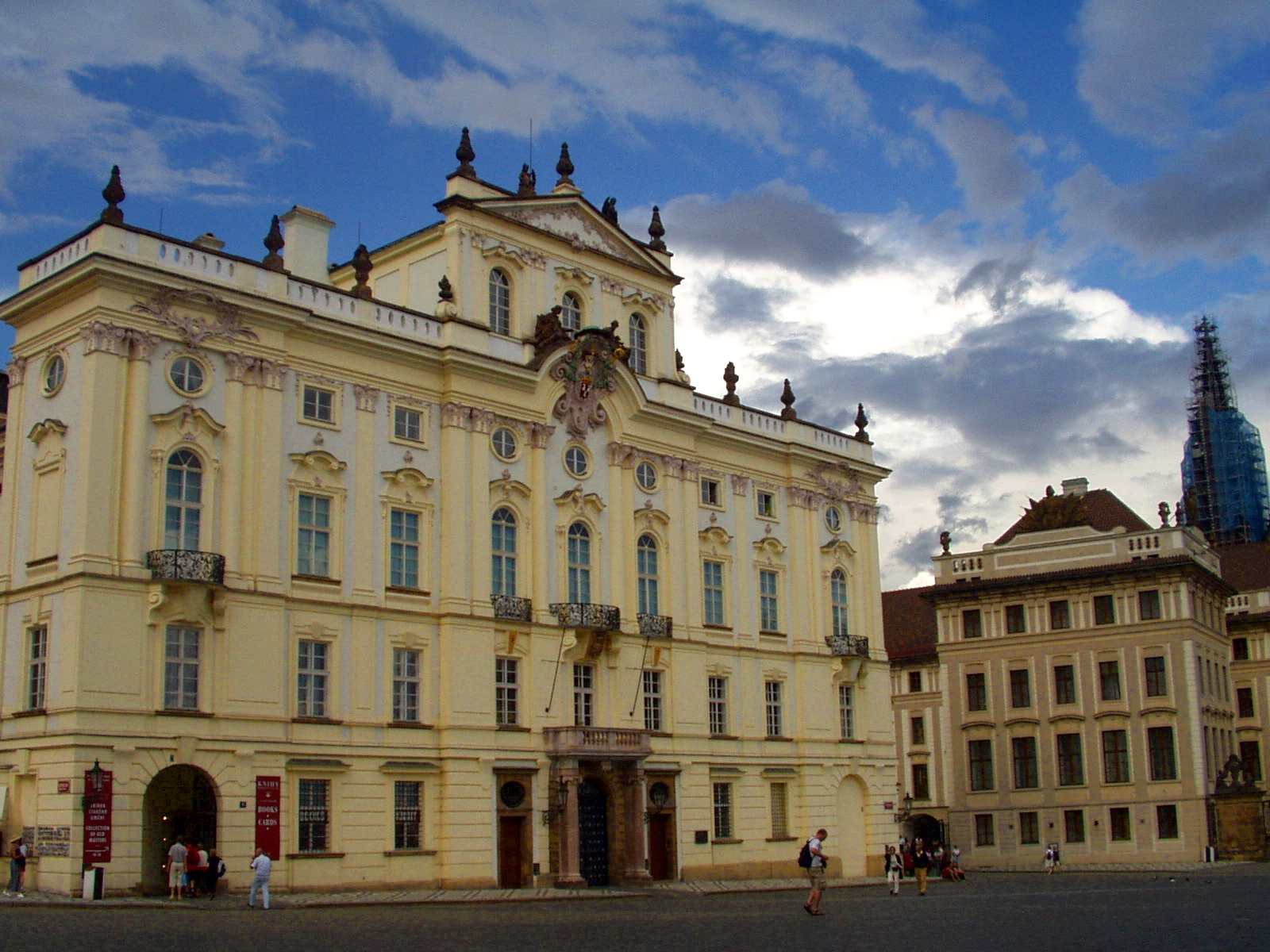 Arcibiskupský palác (Praha) (español: Plaza del Castillo de Praga)